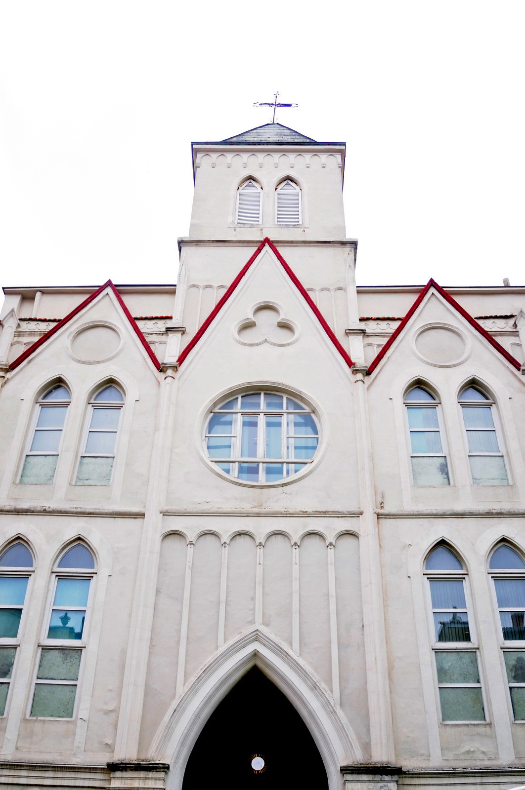 Katolicka crkva ул.”Маршал Тито” , Битола